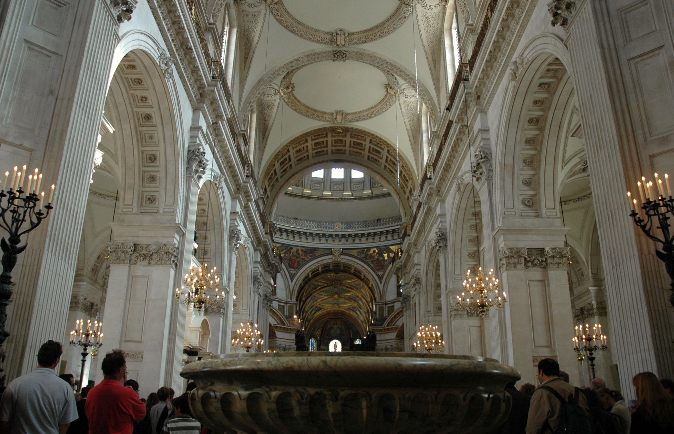 Londres - Catedral de Saint Paul - Interior